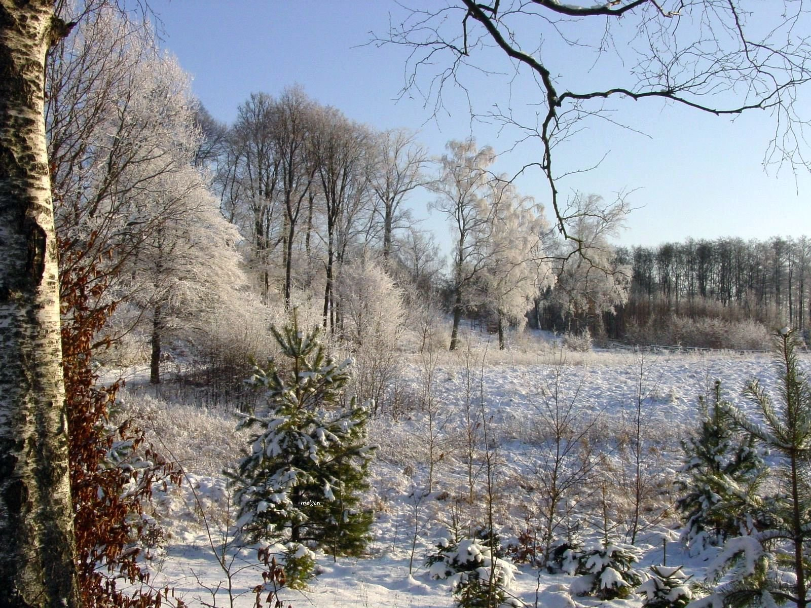 Zima na Mazurach